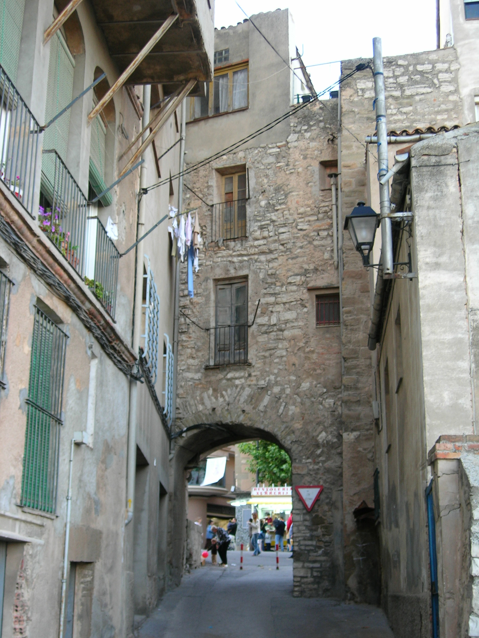 Recinte fortificat de Cervera